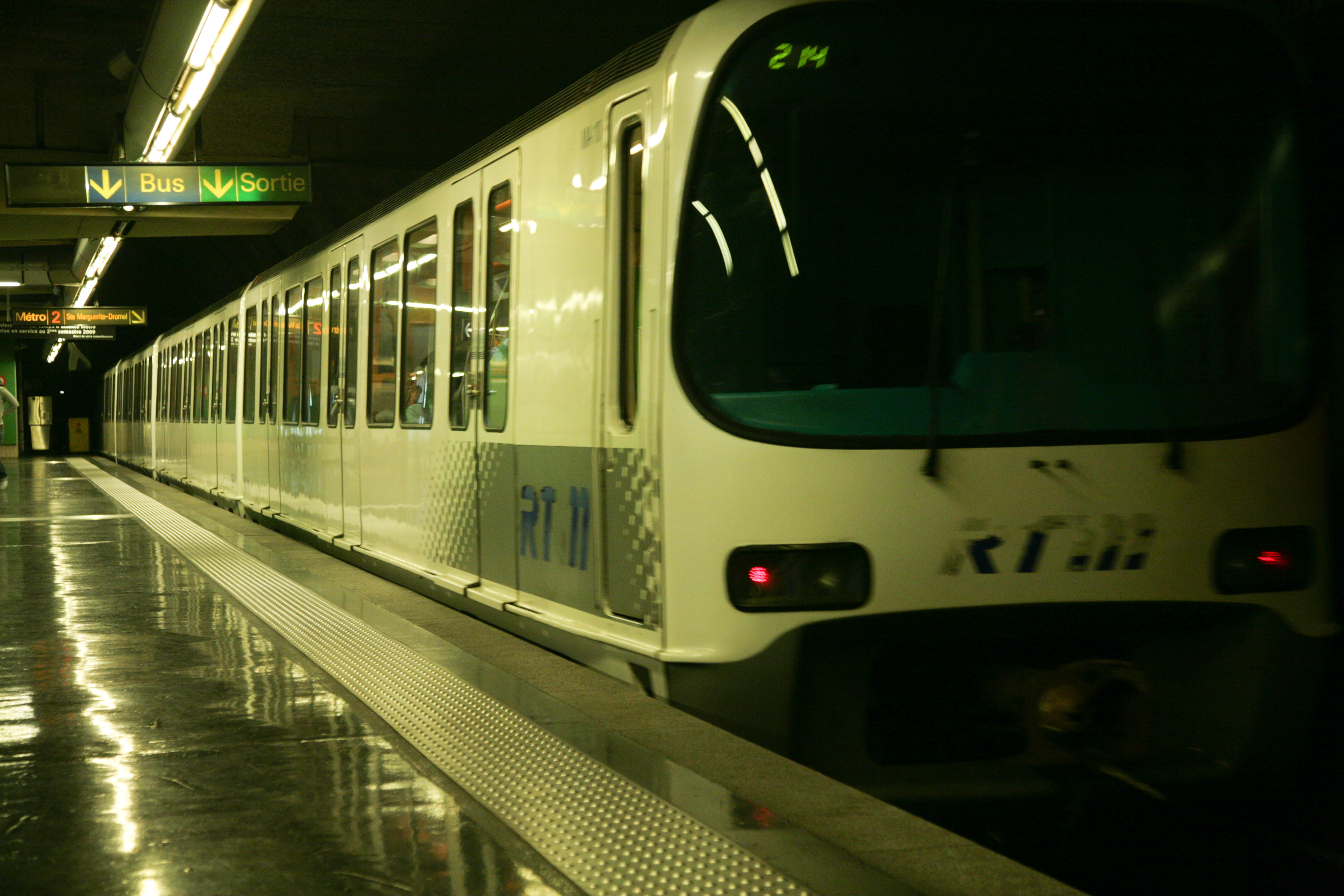 Métro de Marseille, Station ND du Mont